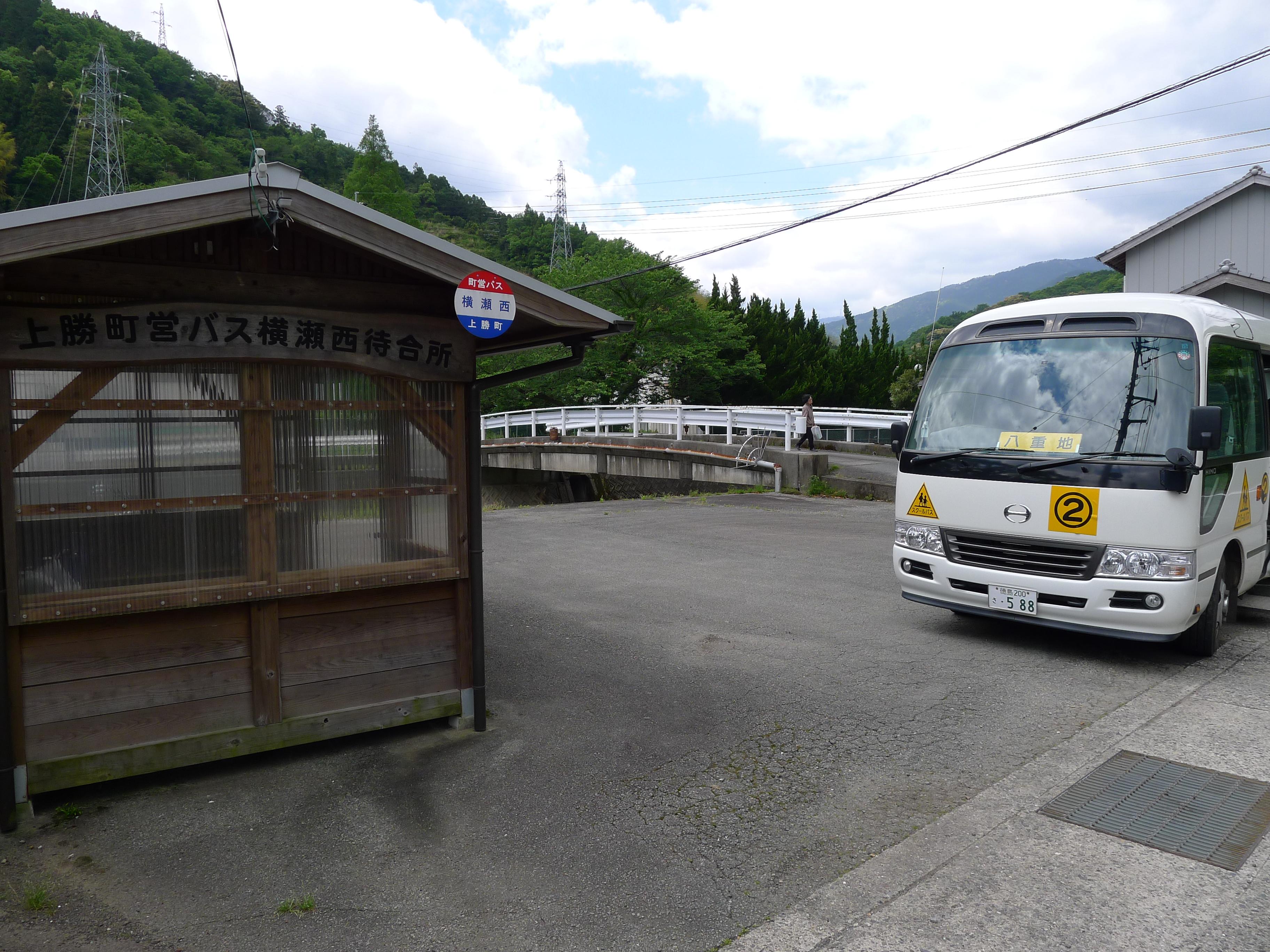 徳島県上勝町の町営バスと横瀬西発着所